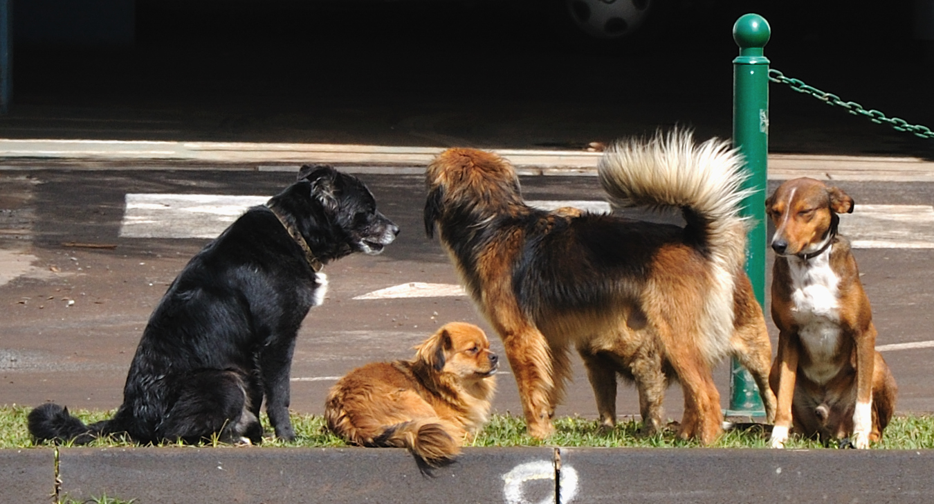 Portugal, Funchal